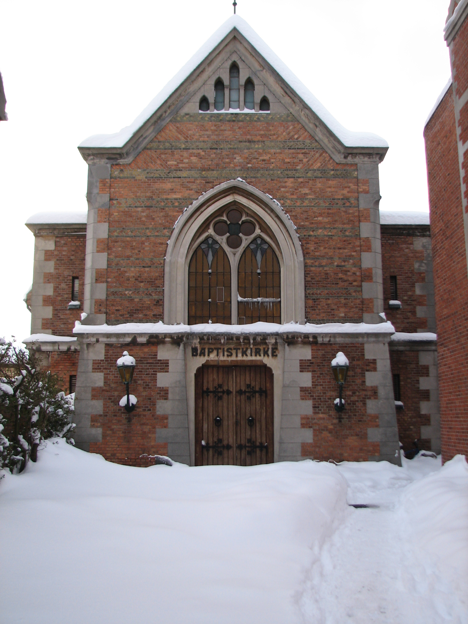 Bornholms Baptistkirke, Rønne (Lille Torv)